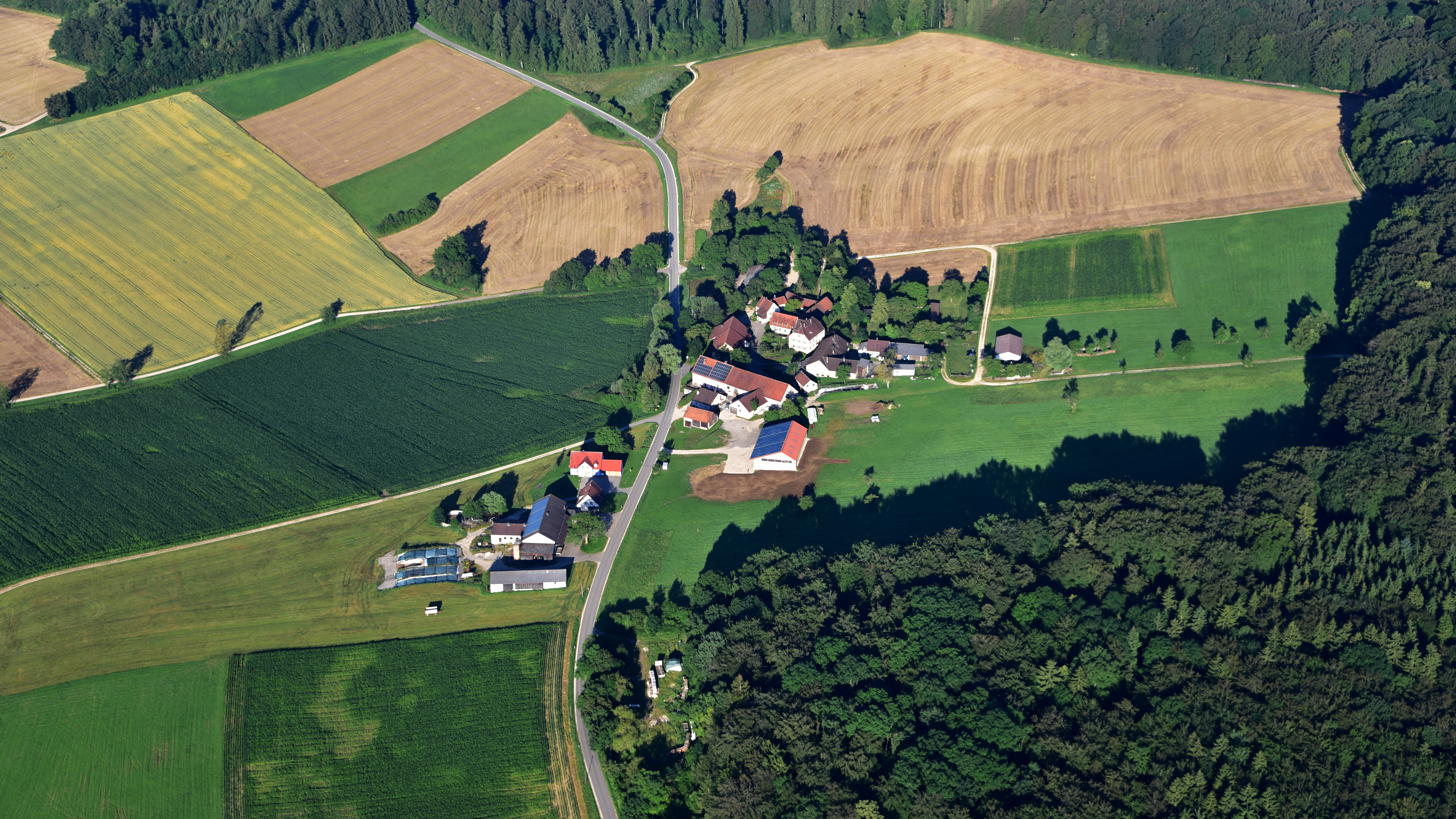 Wieshof (Treuchtlingen), Luftaufnahme (2016)